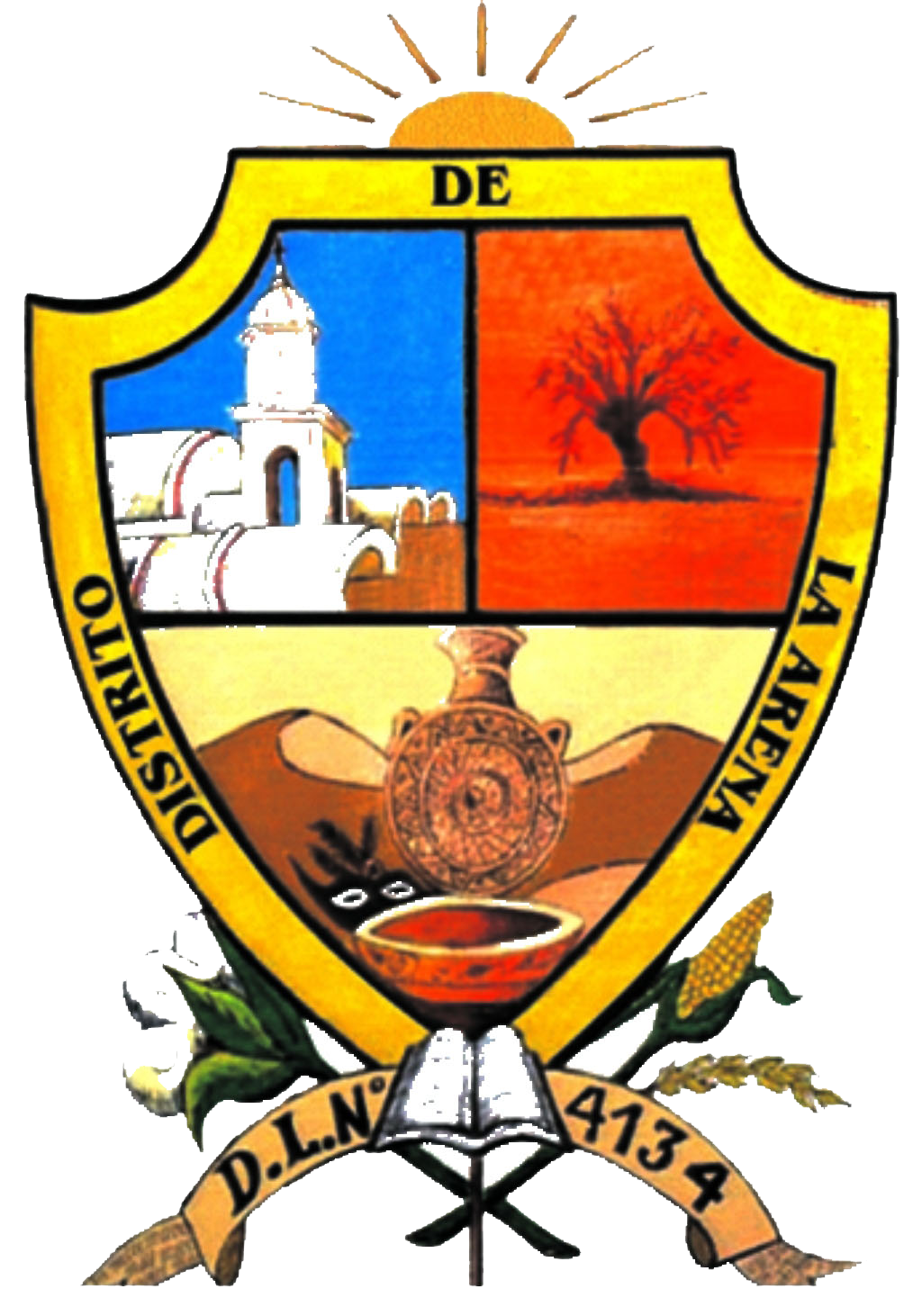 Escudo La Arena